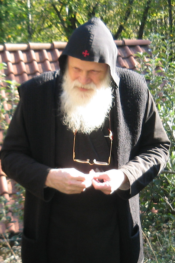 Father Gabriël Bunge